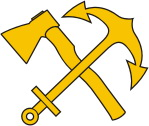 Петличная эмблема железнодорожных войск СССР образца 1936 года. Знаки-эмблемы на петлицы родов войск и служб. Введены приказом НКО СССР № 33 от 10 марта 1936 года. С исправлениями, введенными приказами № 165 от 31 августа 1936 года, № 93 от 30 марта, № 121 от 12 апреля 1942 года, № 25 от 15 января и № 310 от 12 ноября 1943 года. 1. Автобронетанковые войска. 2. Военно-технический состав всех родов войск. 3. Военно-Воздушные Силы. 4. Железнодорожные войска. 5. Артиллерия и артиллерийские подразделения в других родах войск. 6. Автомобильные части и шофера всех родов войск. 7. Войска связи и связисты всех родов войск. 8. Инженерные войска. 9. Военно- медицинский состав всех родов войск. 10. Военно-ветеринарный состав всех родов войск (эмблема, в отличие от желтой медицинской, белого цвета). 11. Химические войска и химические подразделения всех родов войск. 12. Саперные части и саперные подразделения во всех родах войск. 13. Военные музыканты всех родов войск. 14. Военно-хозяйственный и административный состав всех родов войск. 15. Военно-юридический состав всех родов войск. 16. Понтонные части и подразделения инженерных войск. 17. Электротехнические части и подразделения инженерных войск. 18. Железнодорожные войска (приказ № 165). 19. Эмблема военнослужащих интендантской и административной служб (приказ № 93). 20. Военно-технический состав. 21. Кавалерия (в приказе № 25 от 15 января 1943 года количество эмблем было сокращено до 16; №№ 11, 14, 15, 16, 17 вышли из употребления). 22. Военно-топографическая служба (приказ № 25). 23. Дорожные войска (приказ № 310)